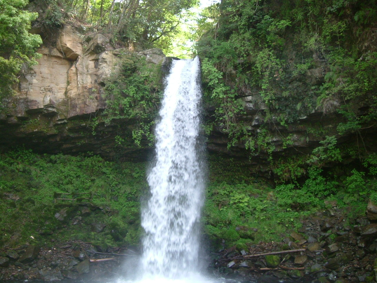 静岡県伊豆市万城の滝（岩盤改変前）